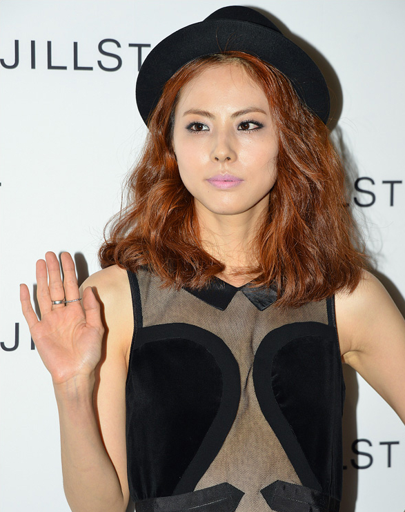 박지윤, LG패션 질스튜어트 2013 S/S 컬렉션 행사에서